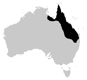 Carte de distribution Cyclorana alboguttata